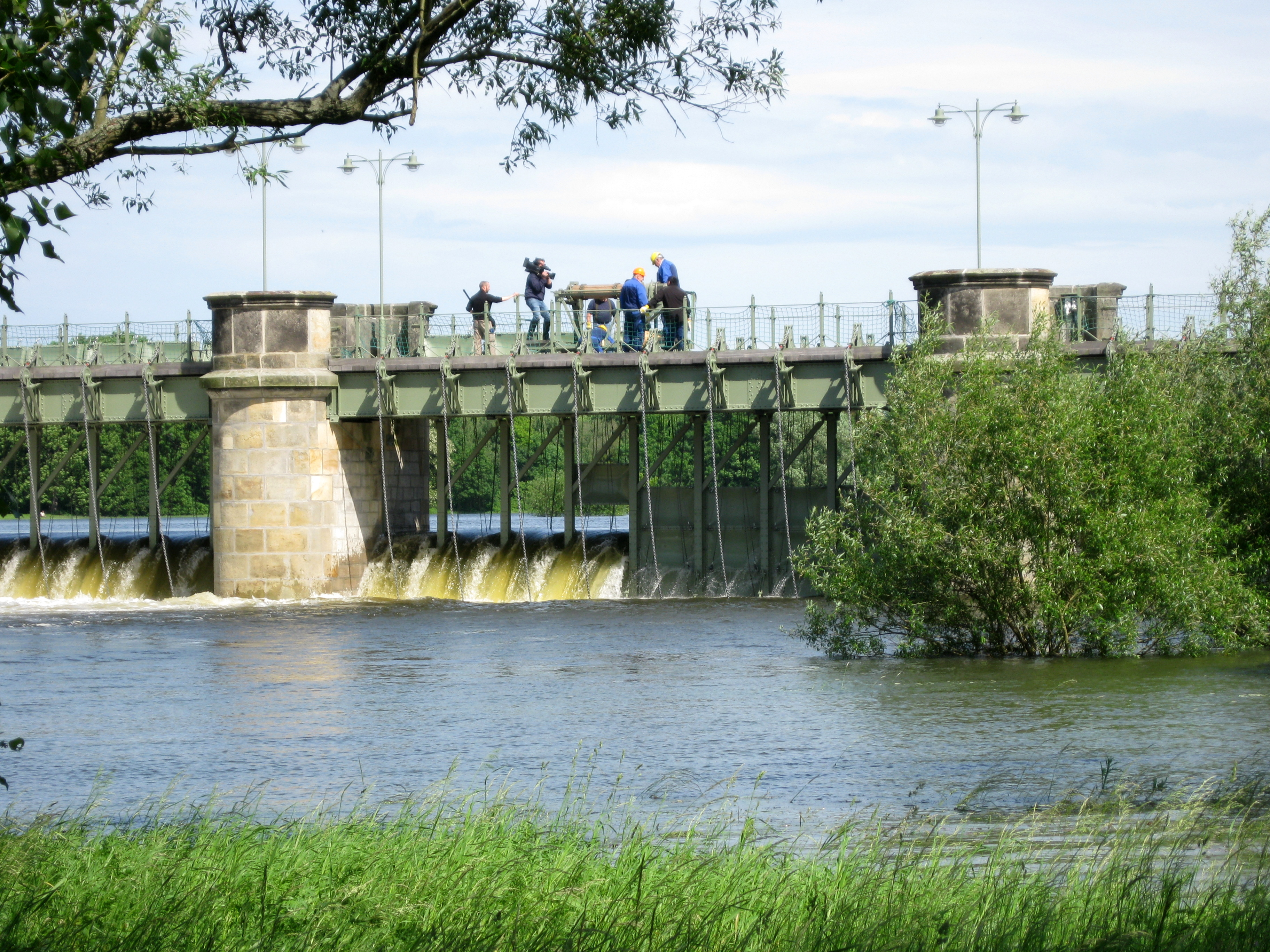 Öffnung des Pretziener Wehr am 3. Juni 2013